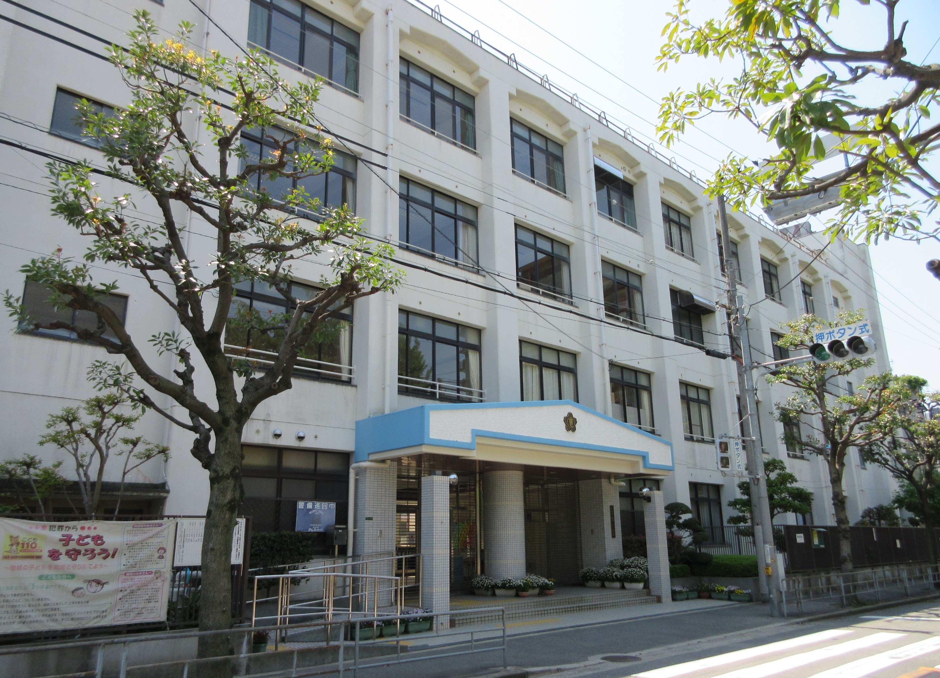 大阪市立豊仁小学校